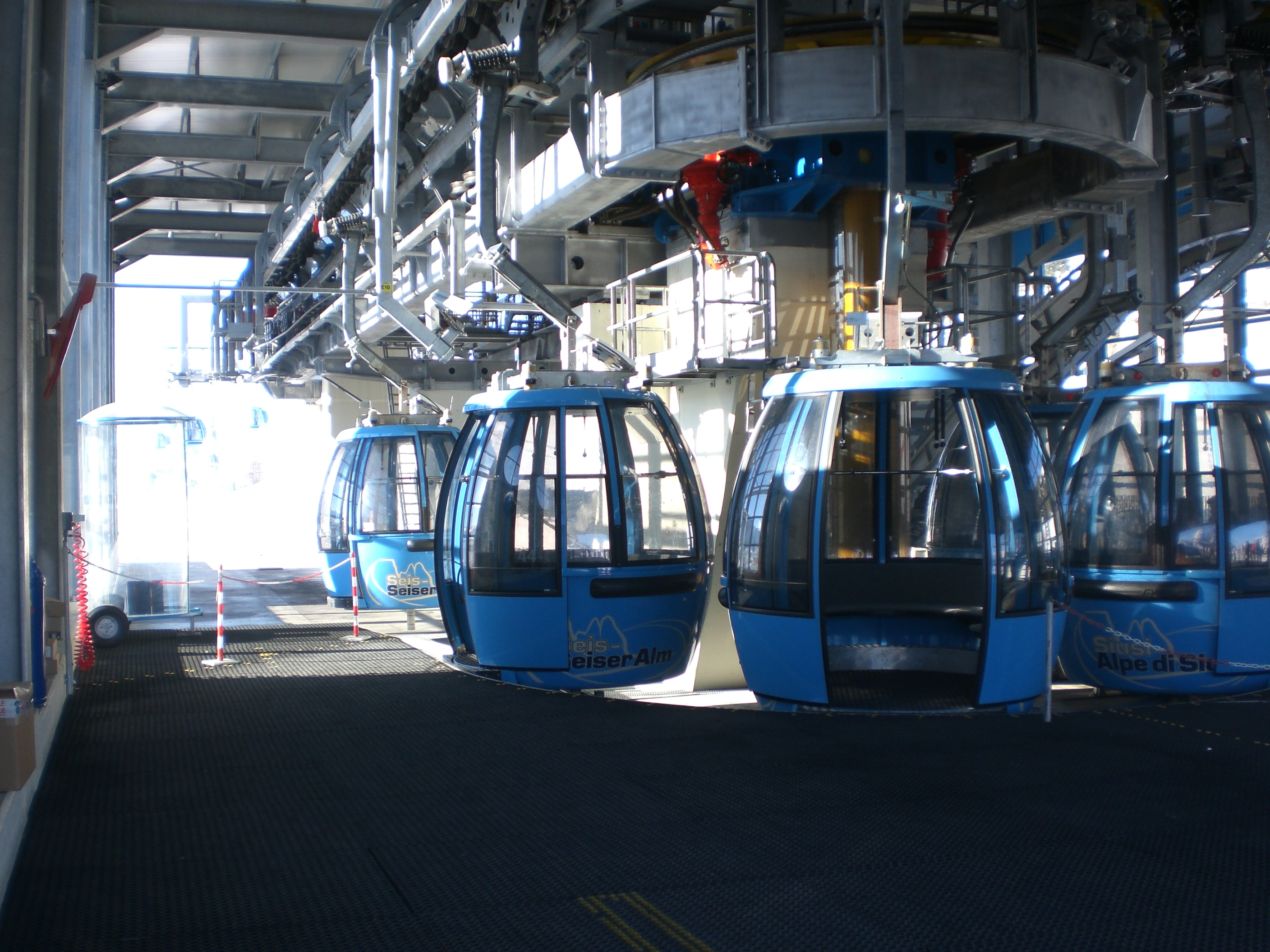 Die Seilbahn auf die Seiser Alm